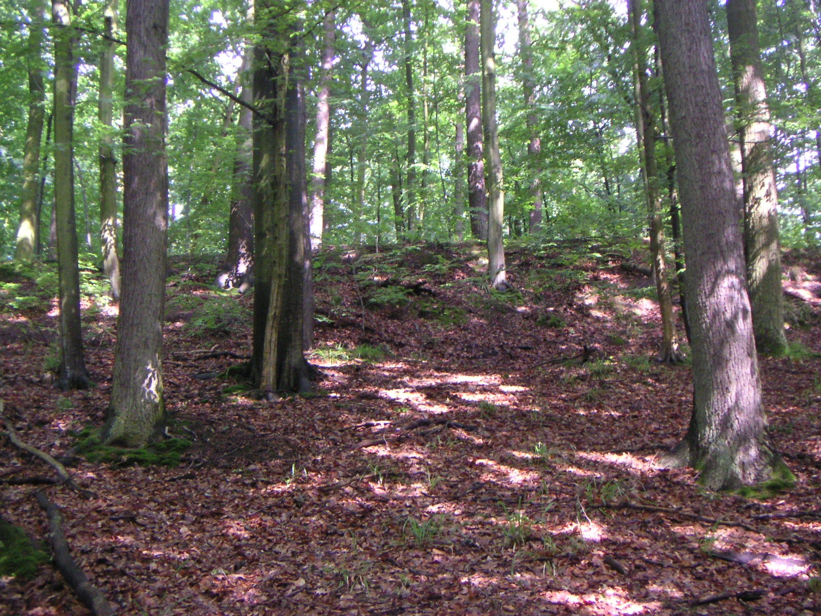 Szczeciński Park Krajobrazowy "Puszcza Bukowa", rezerwat przyrody "Bukowe Zdroje", wzgórze Chojna z grodziskiem, widok z Drogi Grońskiego